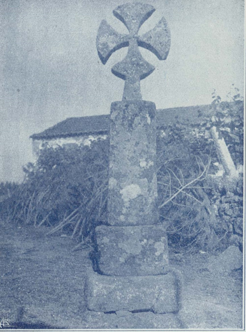 Cruz do Templo_nas terras da Igreja e Comenda da Ordem de Cristo_ Sanfins de Ferreira_Diocese de Braga